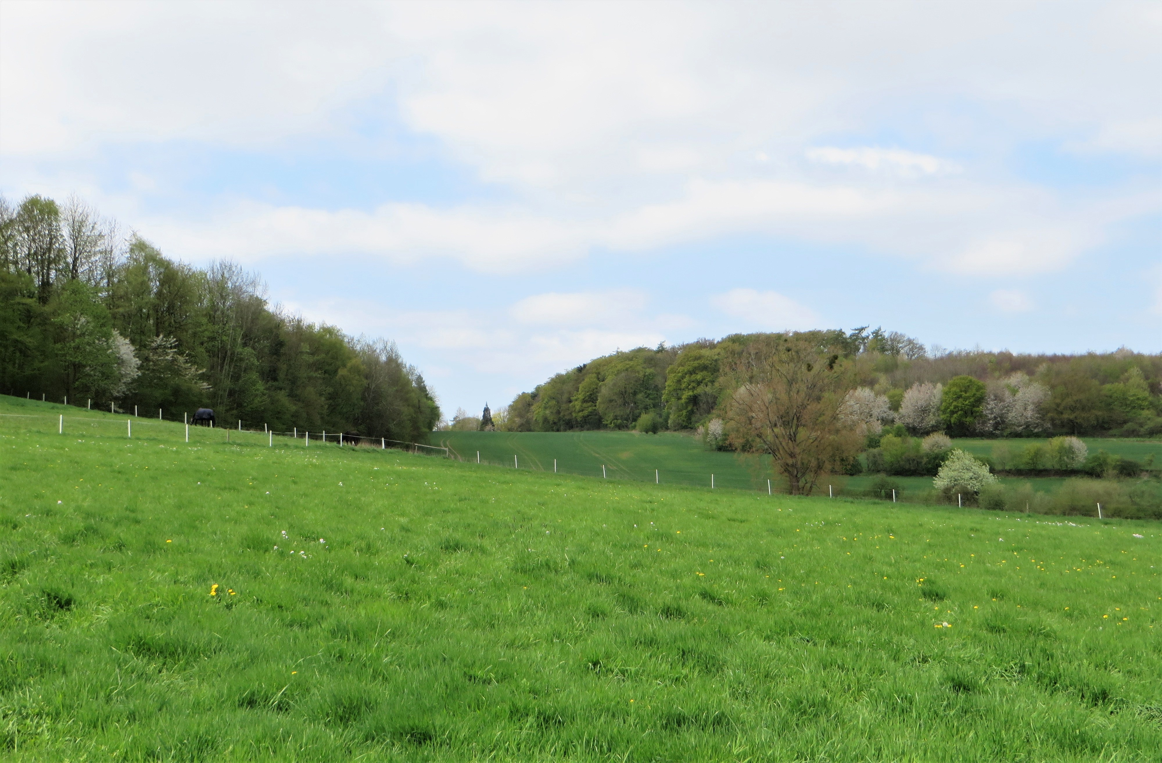 Landschaftsschutzgebiet „Barmerfeld“ in Hagen am Hammacher, zwischen Hohenlimburger Straße (B 7), Hammacherstraße und Herbeck. Es handelt sich um vorwiegend landwirtschaftlich genutzte Flächen, die durch ausgeprägte Siepen und Heckenstrukturen gegliedert werden. In dem Schutzgebiet befindet sich das wertvolle Buchenaltholz „Nacken“.